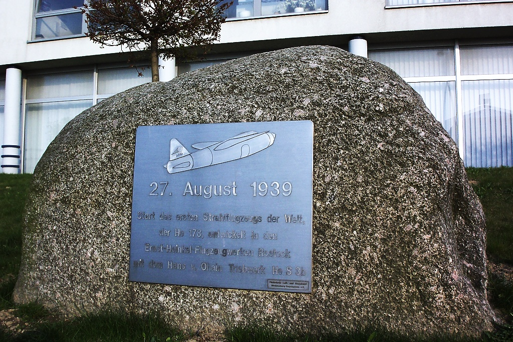 Privater Gedenkstein für den Start des ersten Strahlflugzeuges von Hans von Ohain bei den Heinkel-Flugzeugwerken in Rostock-Marienehe